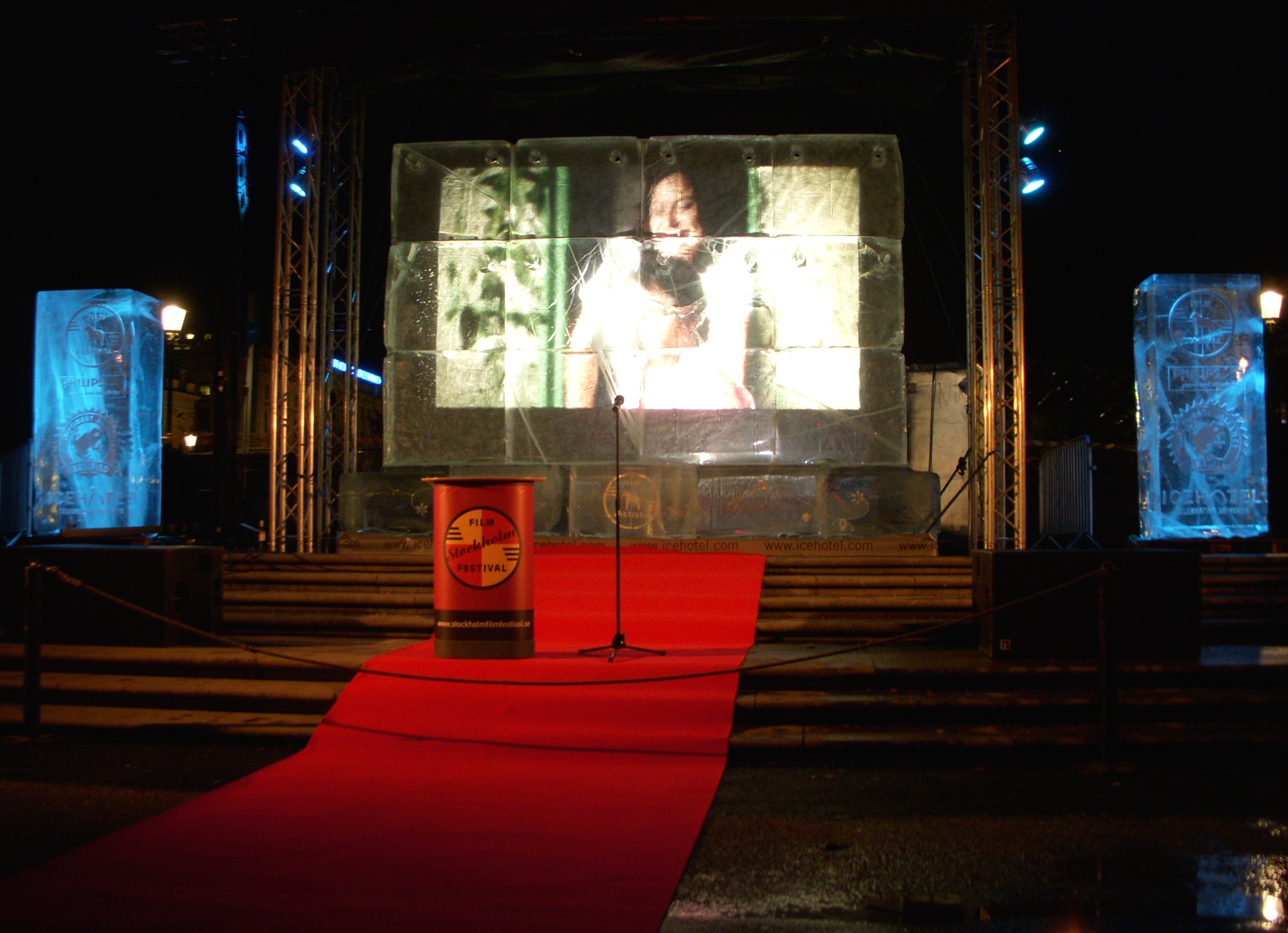 Stockholms filmfestival i Kungsträdgården 21 november 2009